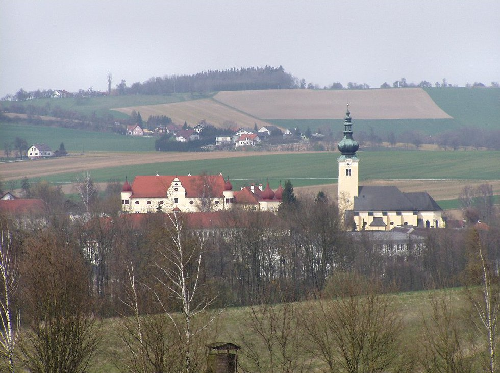 Blick vom Süden auf Buchkirchen